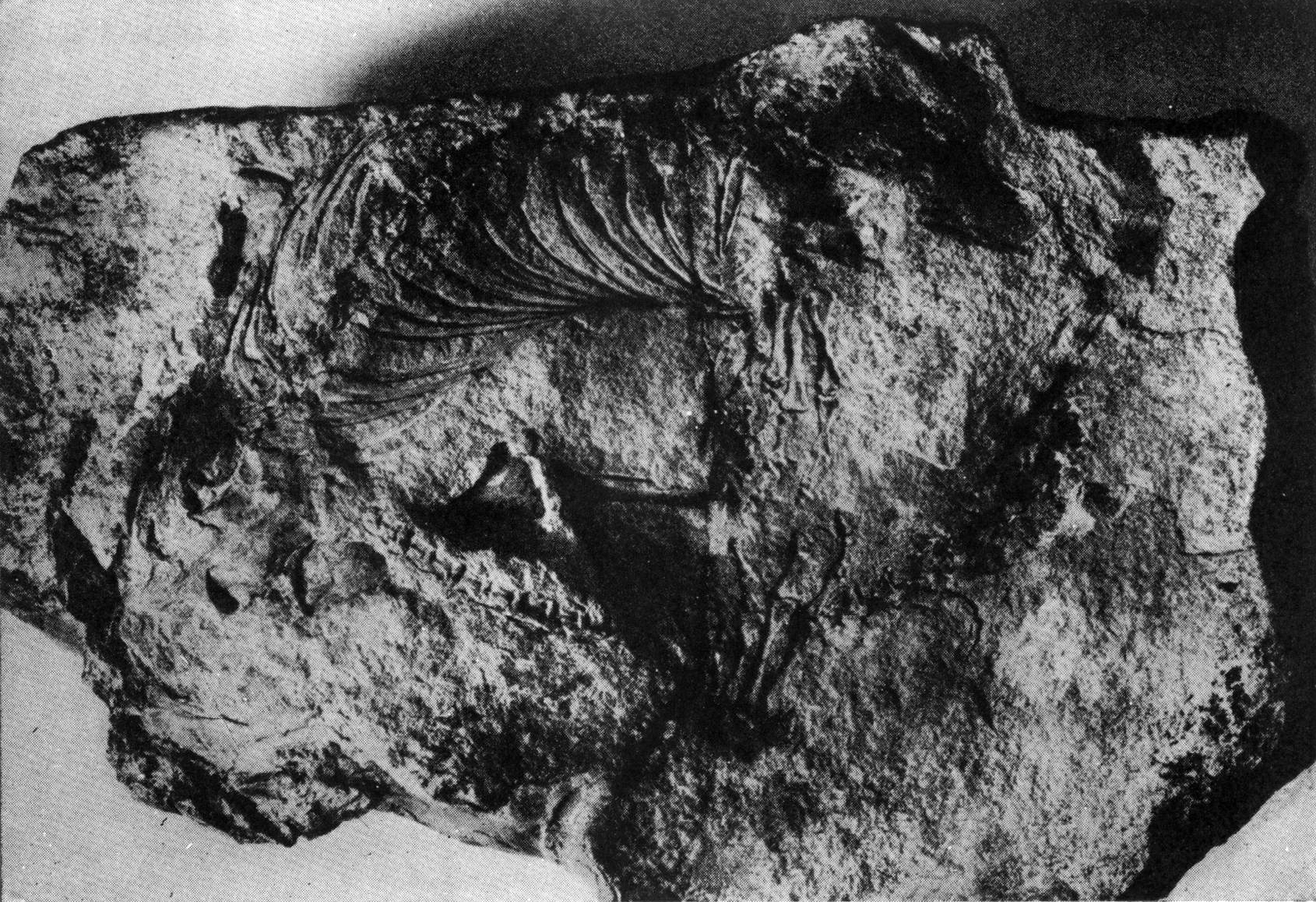 Galepus jouberti fossil, specimen 5541